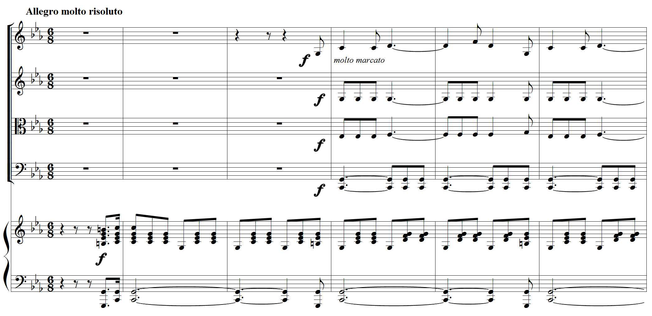 Quintette pour piano et cordes op.42 de Louis Vierne 3ème mouvement, thème héroïque